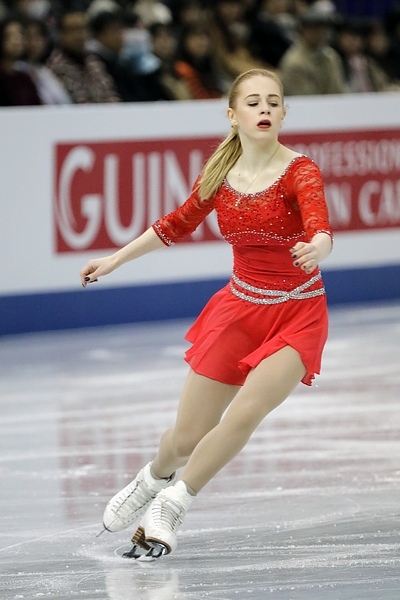 Дарья Паненкова (Россия) на финале юниорского Гран-при 2017-2018